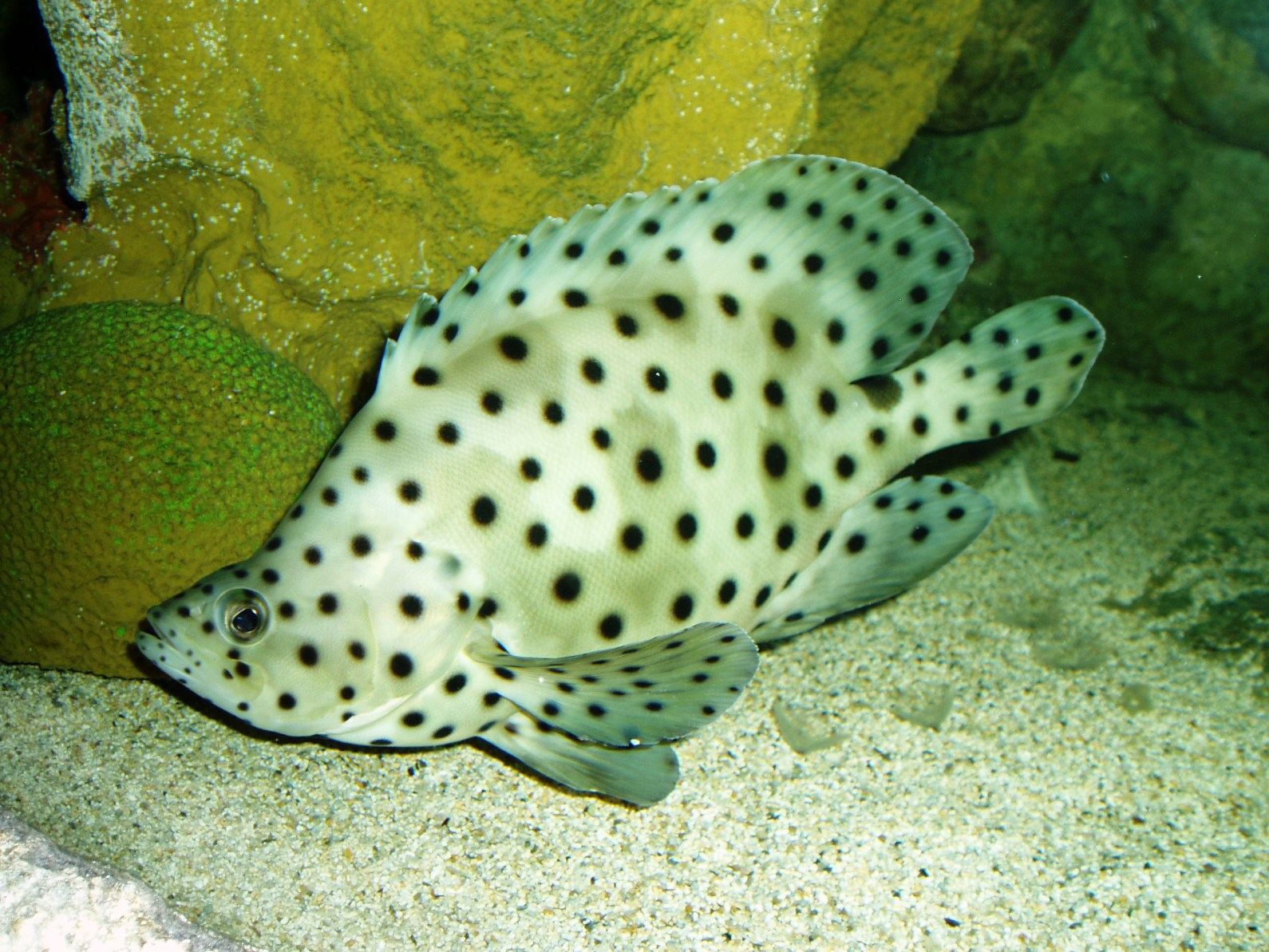 Panther grouper (Cromileptes altivelis), photo taken at Skansen akvarium, Stockholm